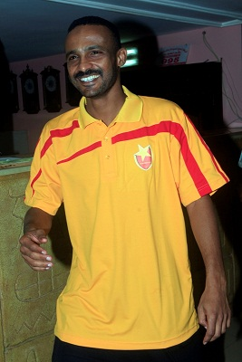 هيثم مصطفى لاعب المريخ